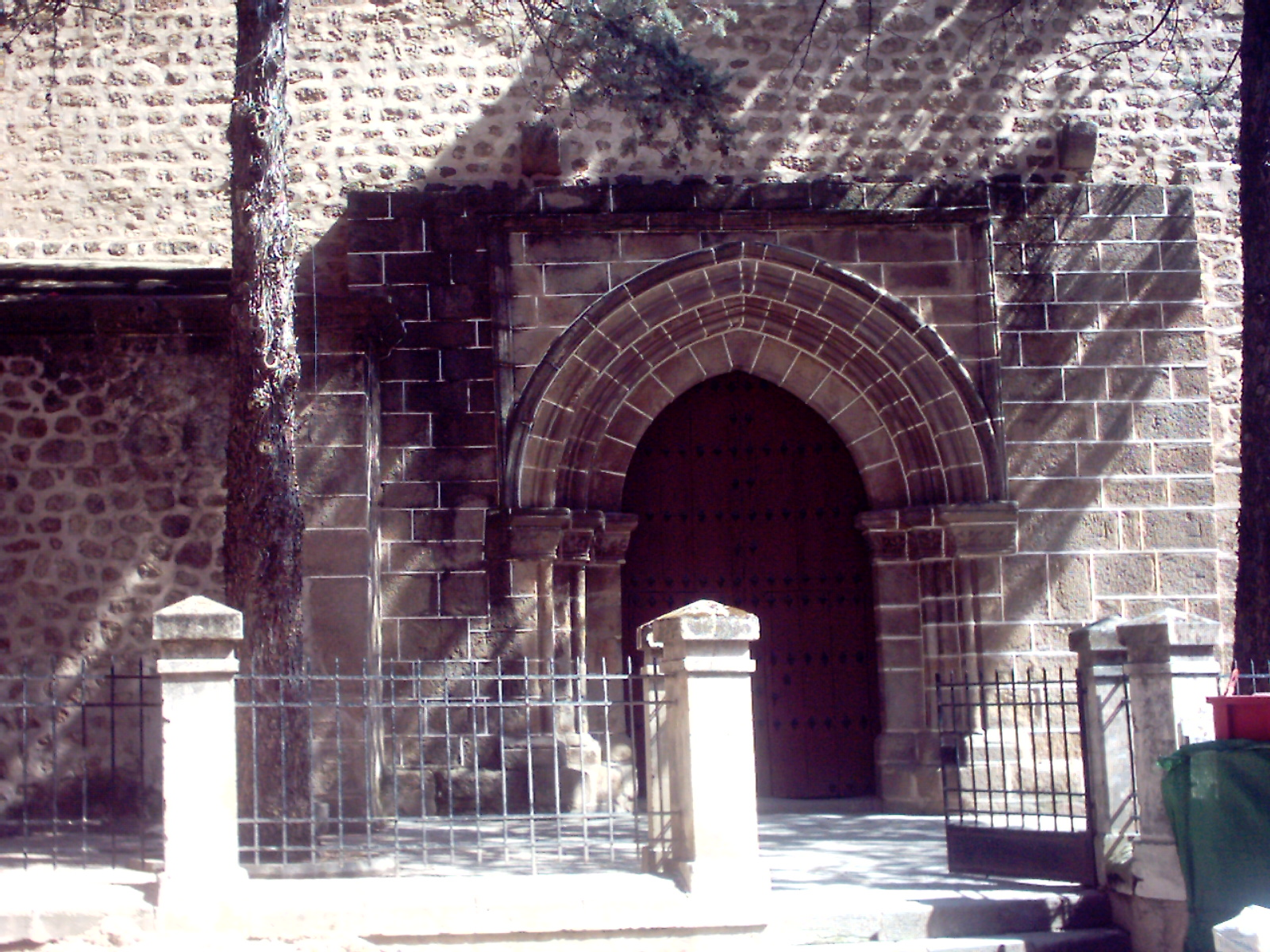 Fachada del Corral de los Alcaldes, en la Iglesia de San Esteban, Plasencia, España